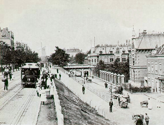 De Oostzeedijk in Rotterdam. Foto van prentbriefkaart uit nl:1900, fotograaf onbekend.